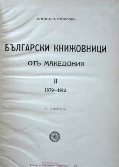 Българи книжовници от Македония